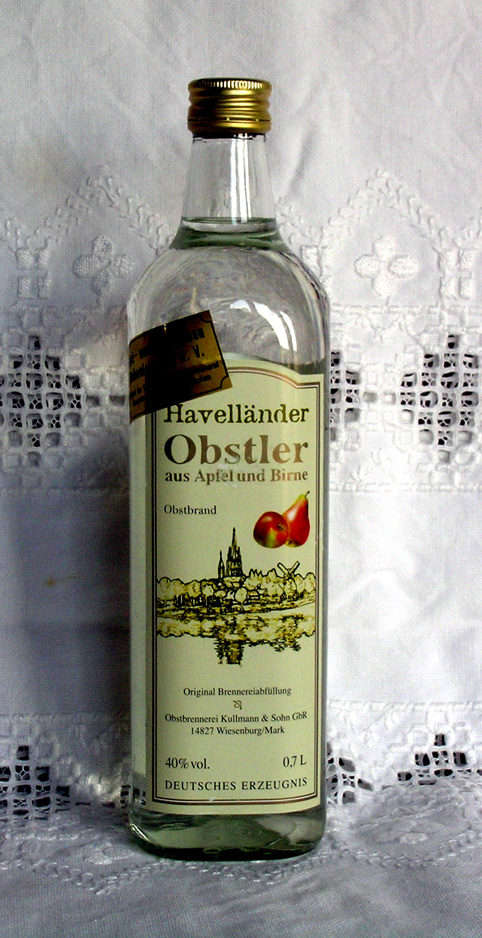 Havelländer Obstler.